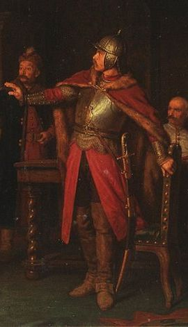 Фрагмент картины "Anna Dorota Chrzanowska na zamku w Trembowli"